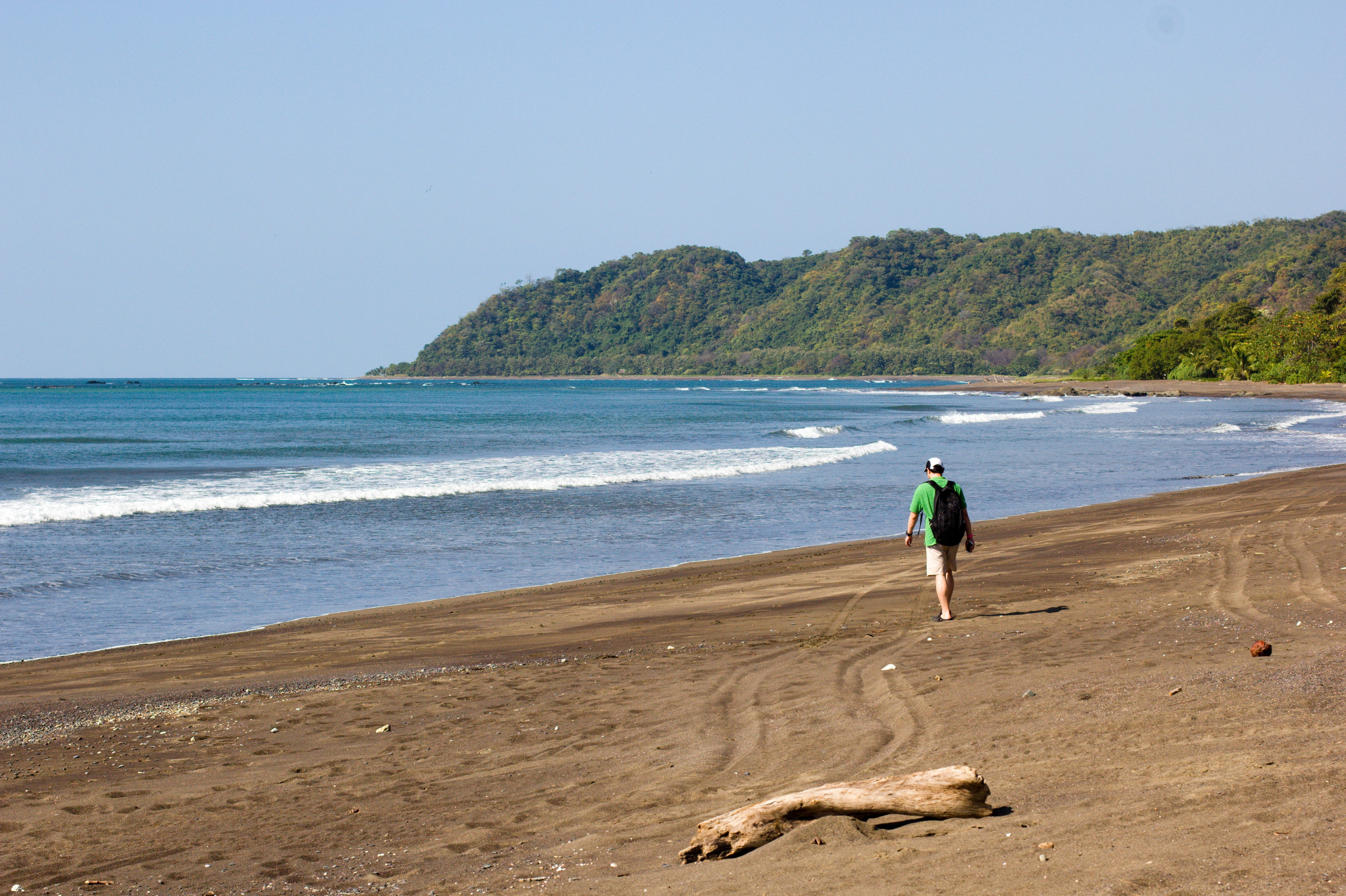 Cambutal, Provincia de los Santos, Panamá.